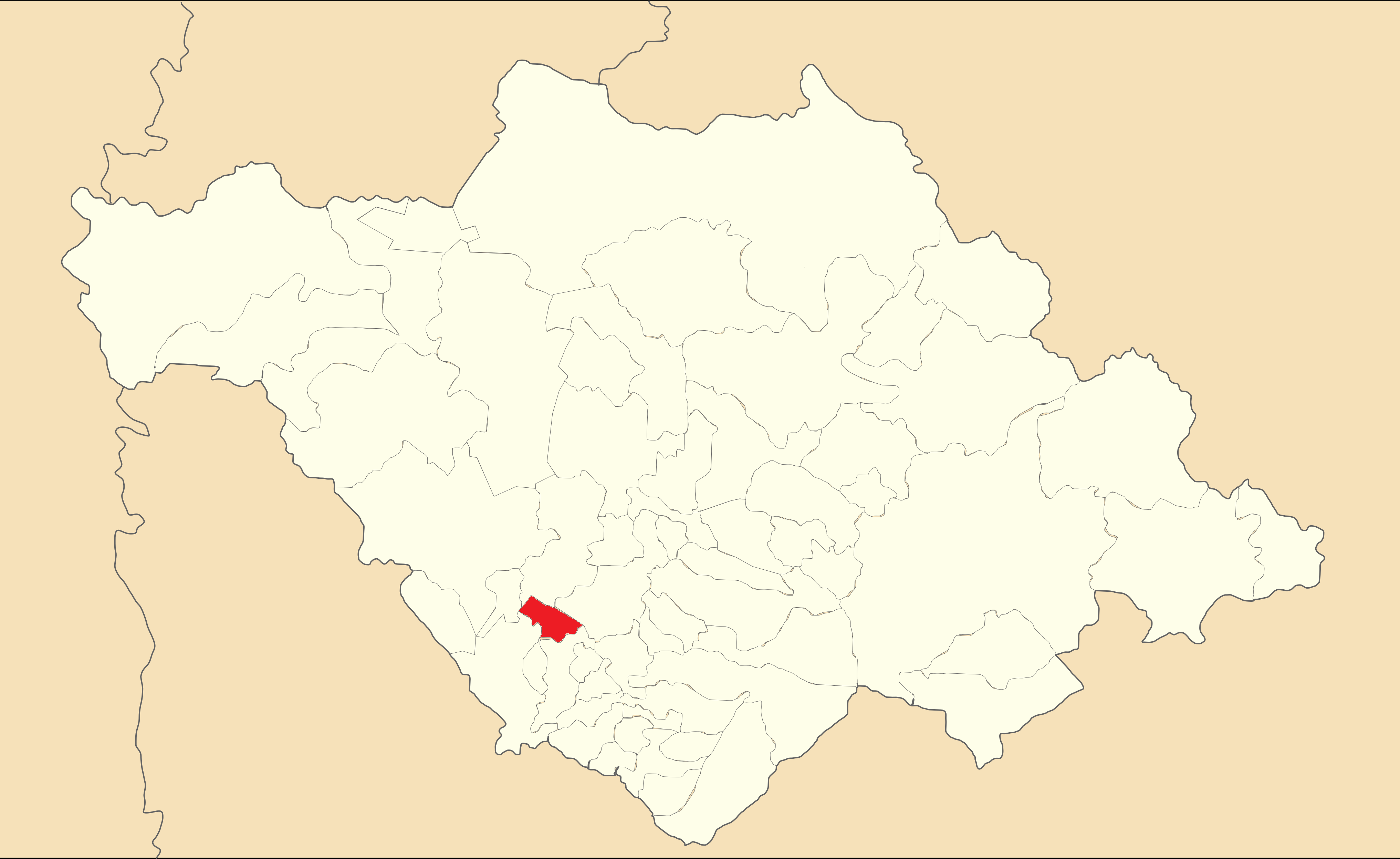 Mapa de localización del municipio de San Damián Texoloc en Tlaxcala, México